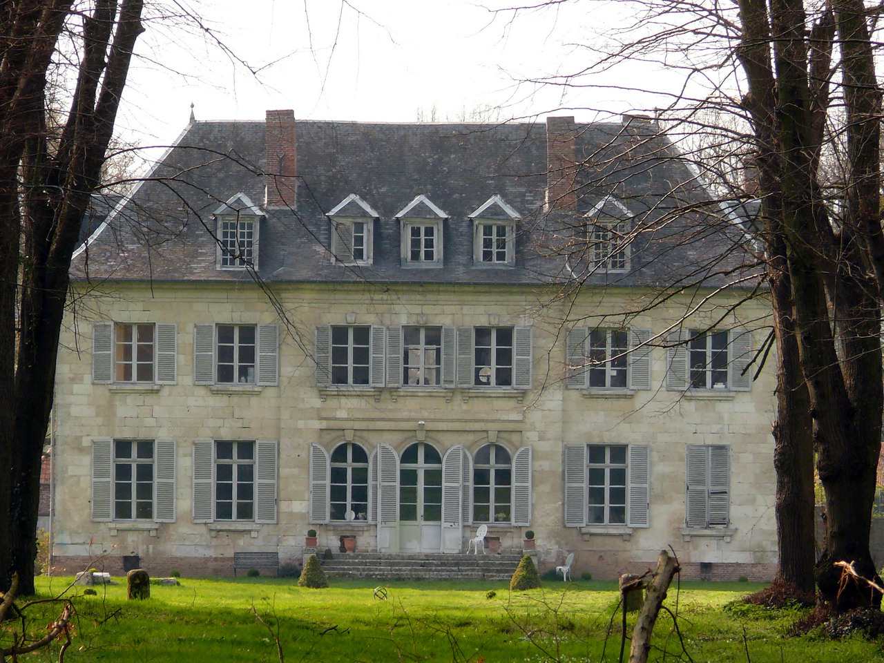 Château de Tilloy-lès-Conty (France - Somme)